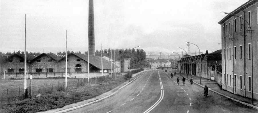 Via Basso Acquar a Verona, come si presentava nel 1955